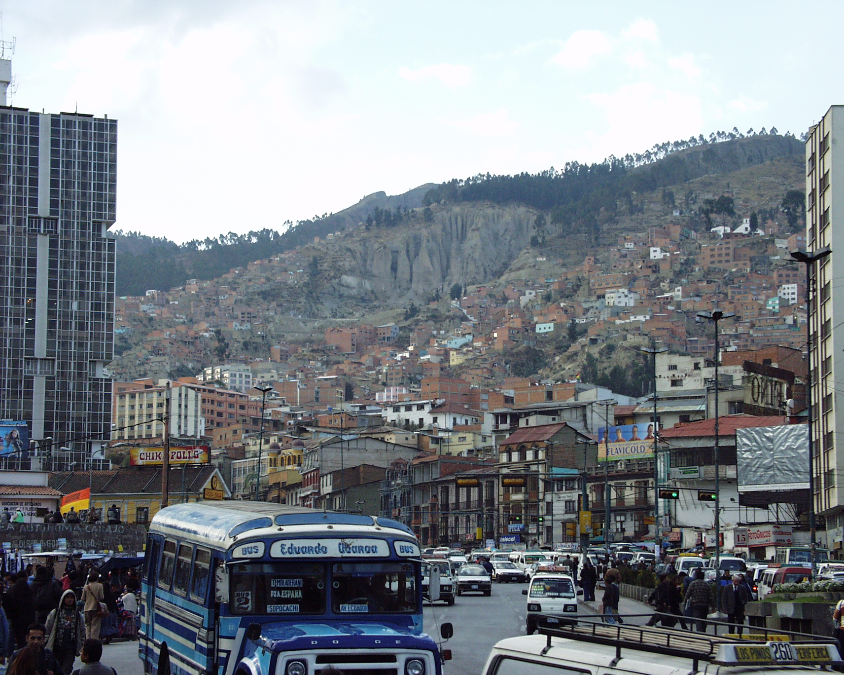 La Paz,Bolivia